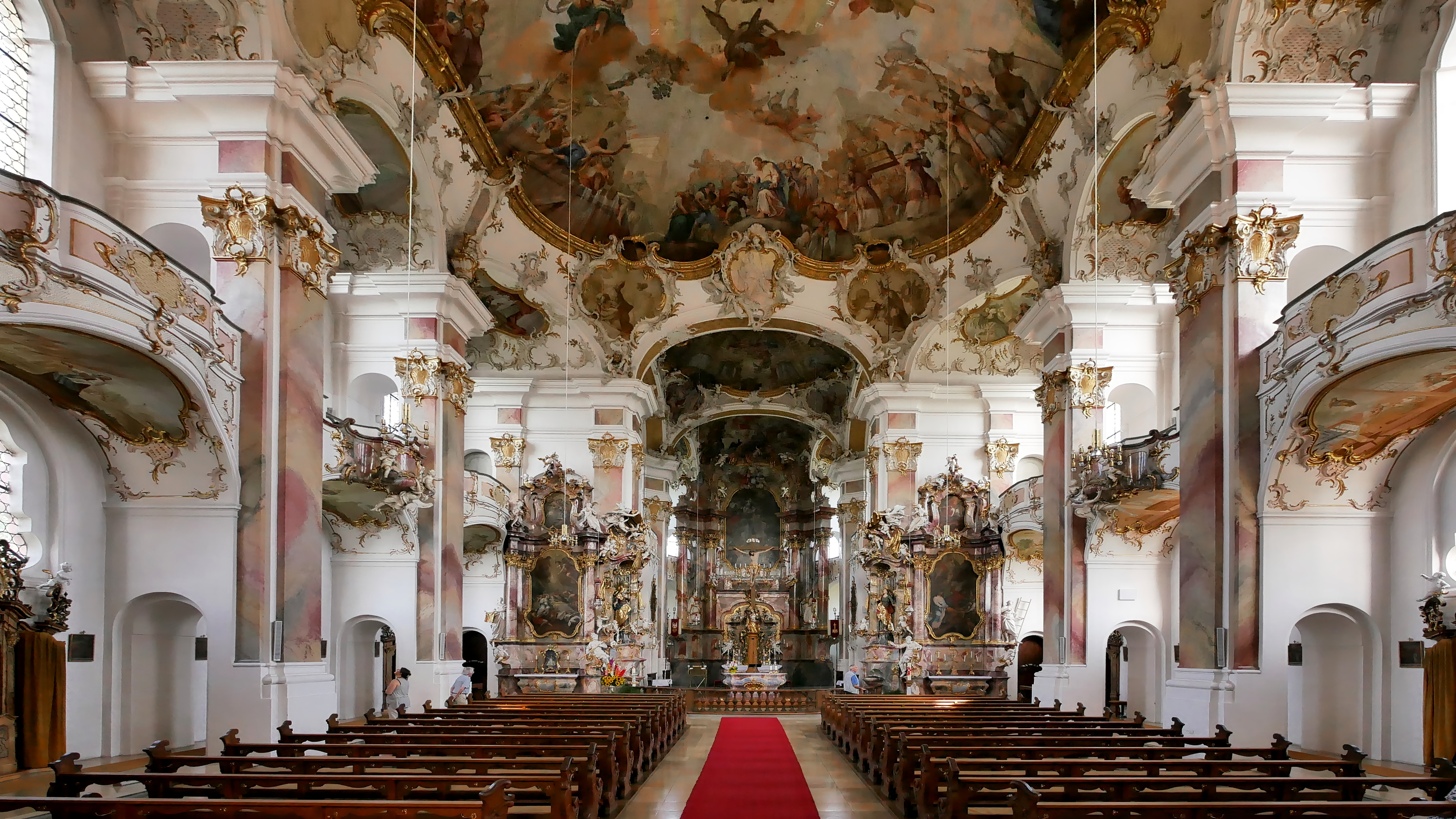 Die Wallfahrtskirche Maria Steinbach im Landkreis Unterallgäu (Bayern)